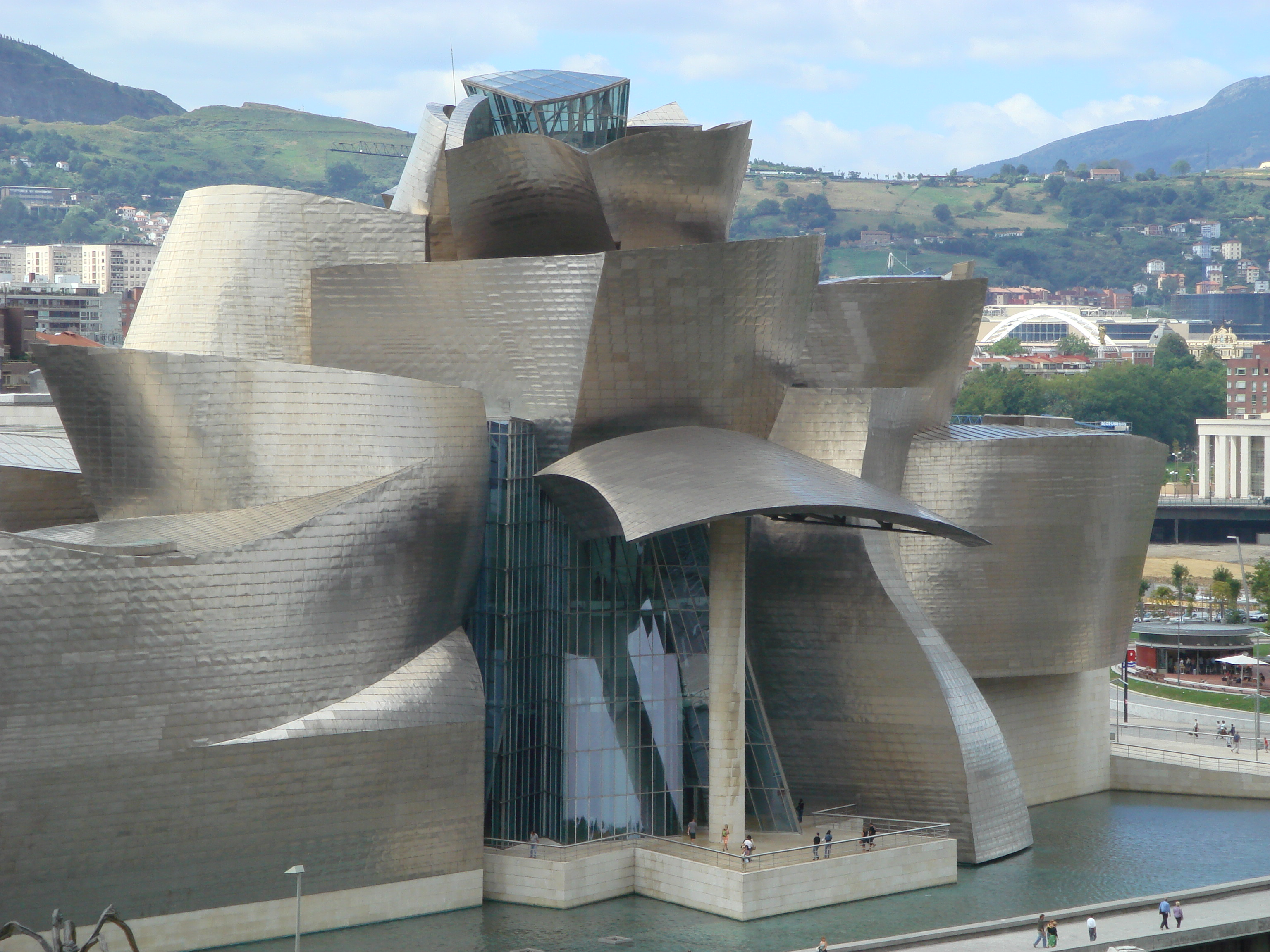 El Guggenheim vizcaíno.